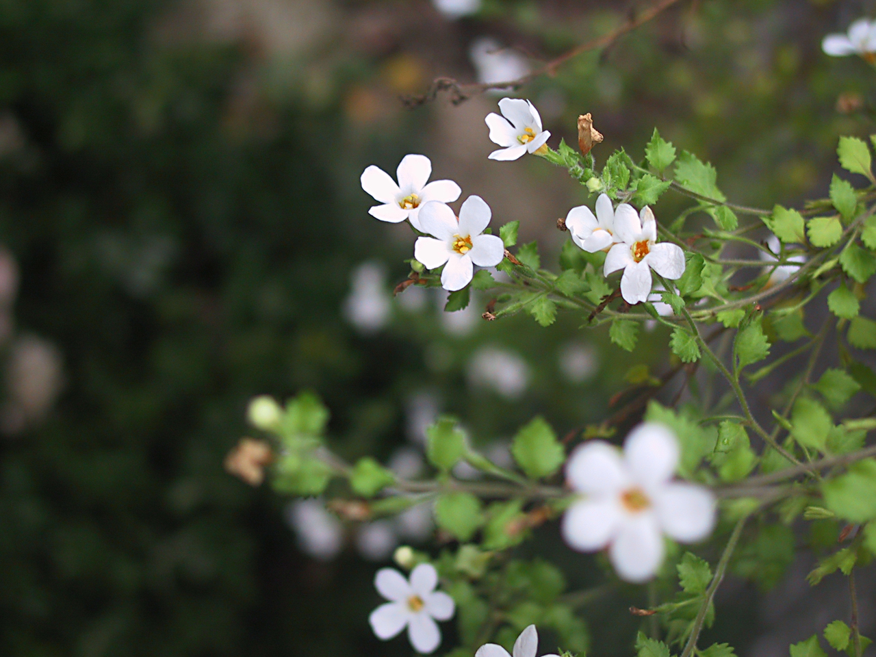 Bacopa diffusus cv. Snowflake